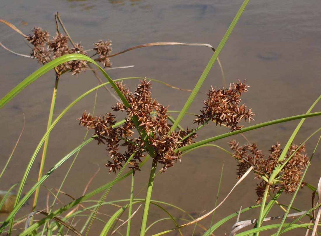 Cyperus javanicus, close up; (mahelehele in Tongan)